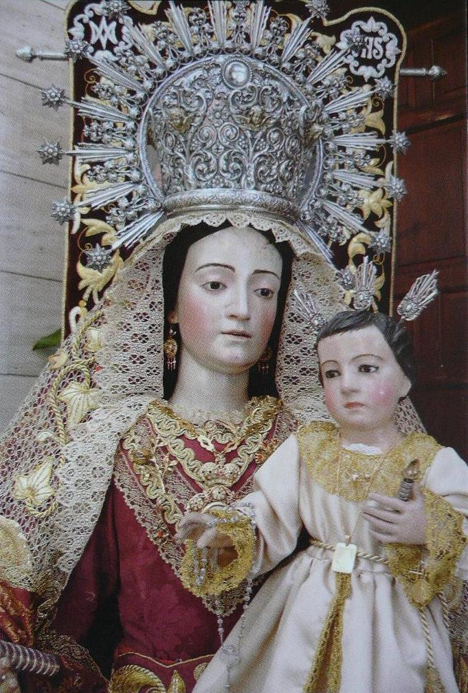 Virgen de la Candelaria, obra de Andrés de Ocampo, en el Santuario de San Juan Grande, Jerez de la Frontera, provincia de Cádiz, España.